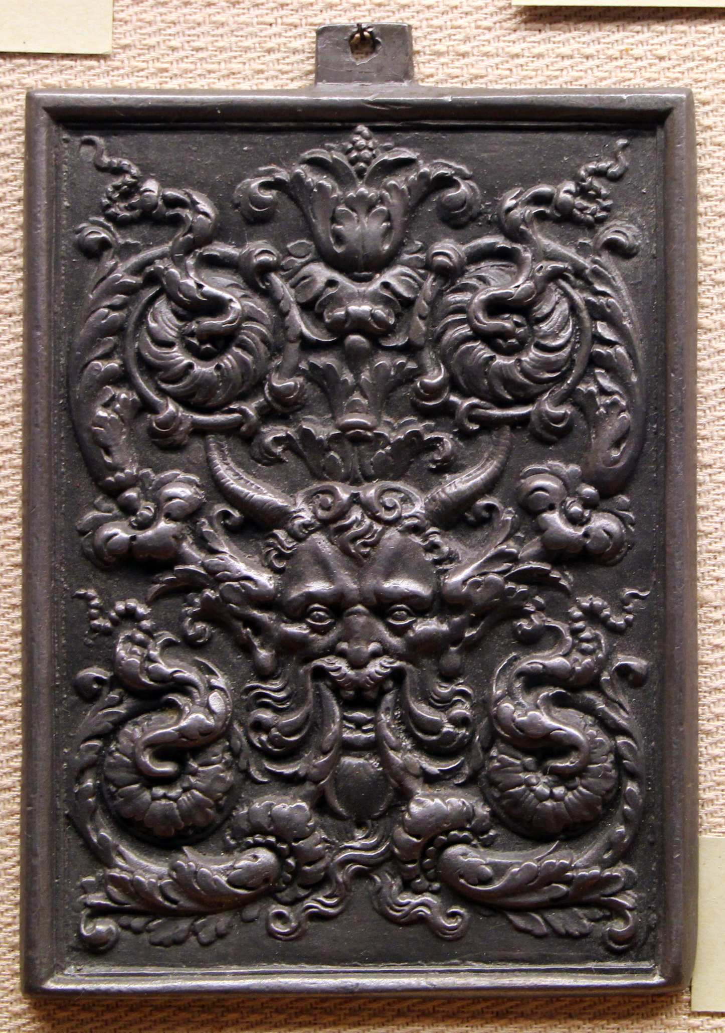 Placchette rinascimentali e barocche